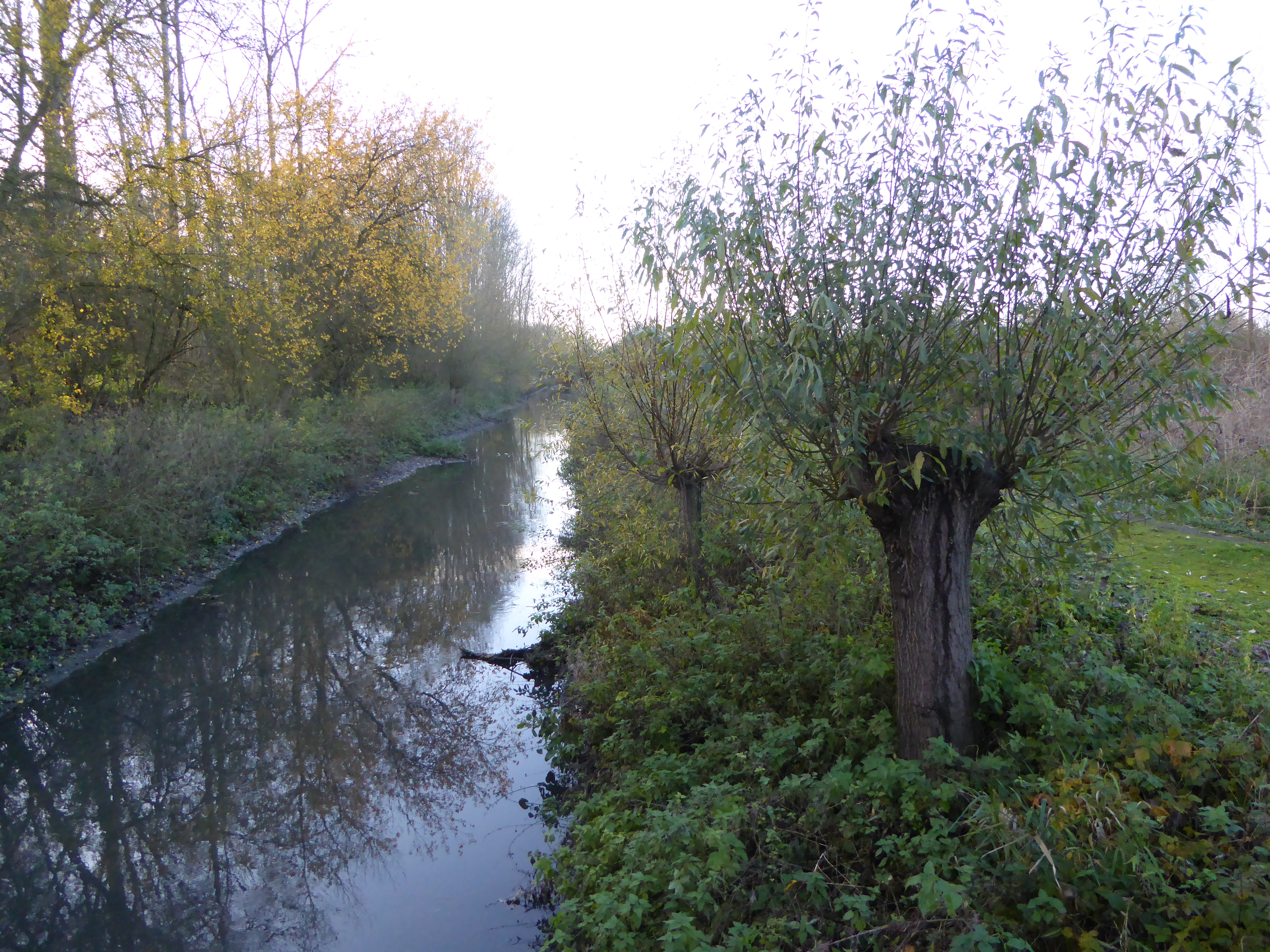 La Marque à Fretin à hauteur du Marais de Bonance